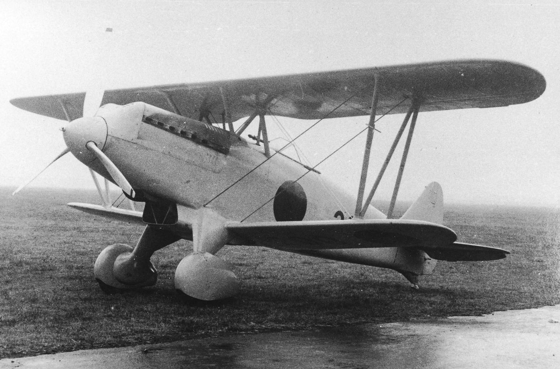 キ-10（95式戦闘機）性能向上第2案型